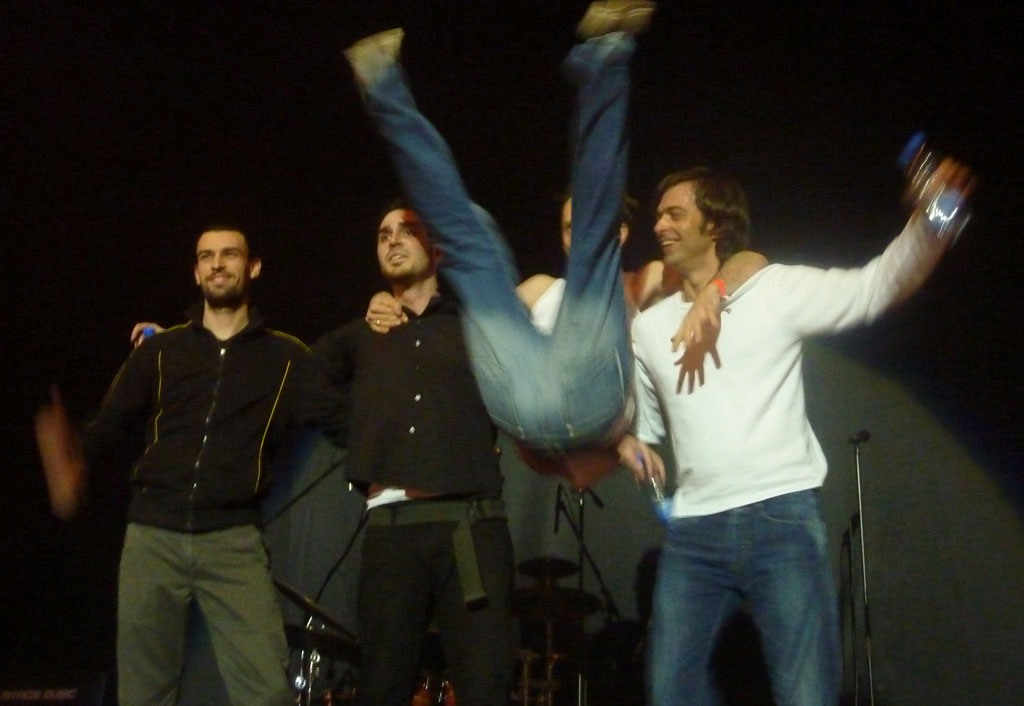 Rare